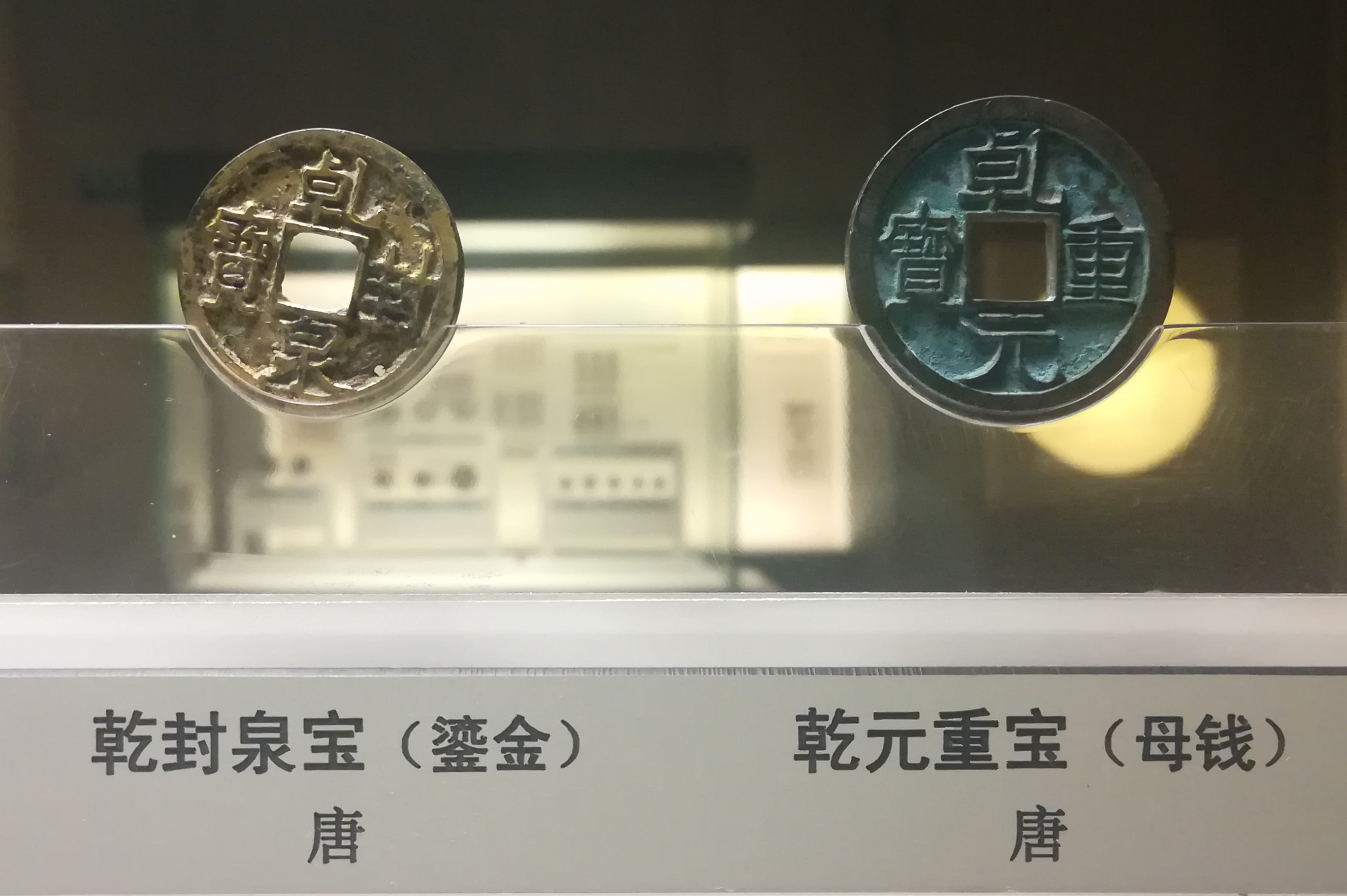 中文（中国大陆）: 乾封泉宝（左。鎏金，唐）；乾元重宝（右。母钱，唐）